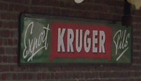 Uithangbord Brouwerij Krüger uit Eeklo - Oost-Vlaanderen - België